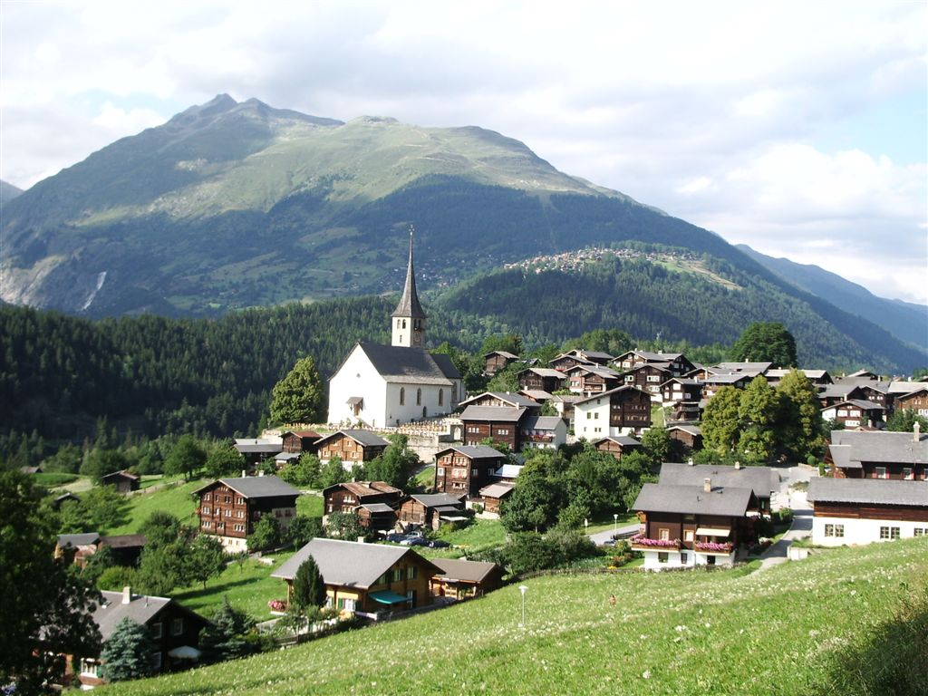 Blick von Ernen VS auf die Sonnenterrasse von Bellwald Bild im August 2006 selbst aufgenommen